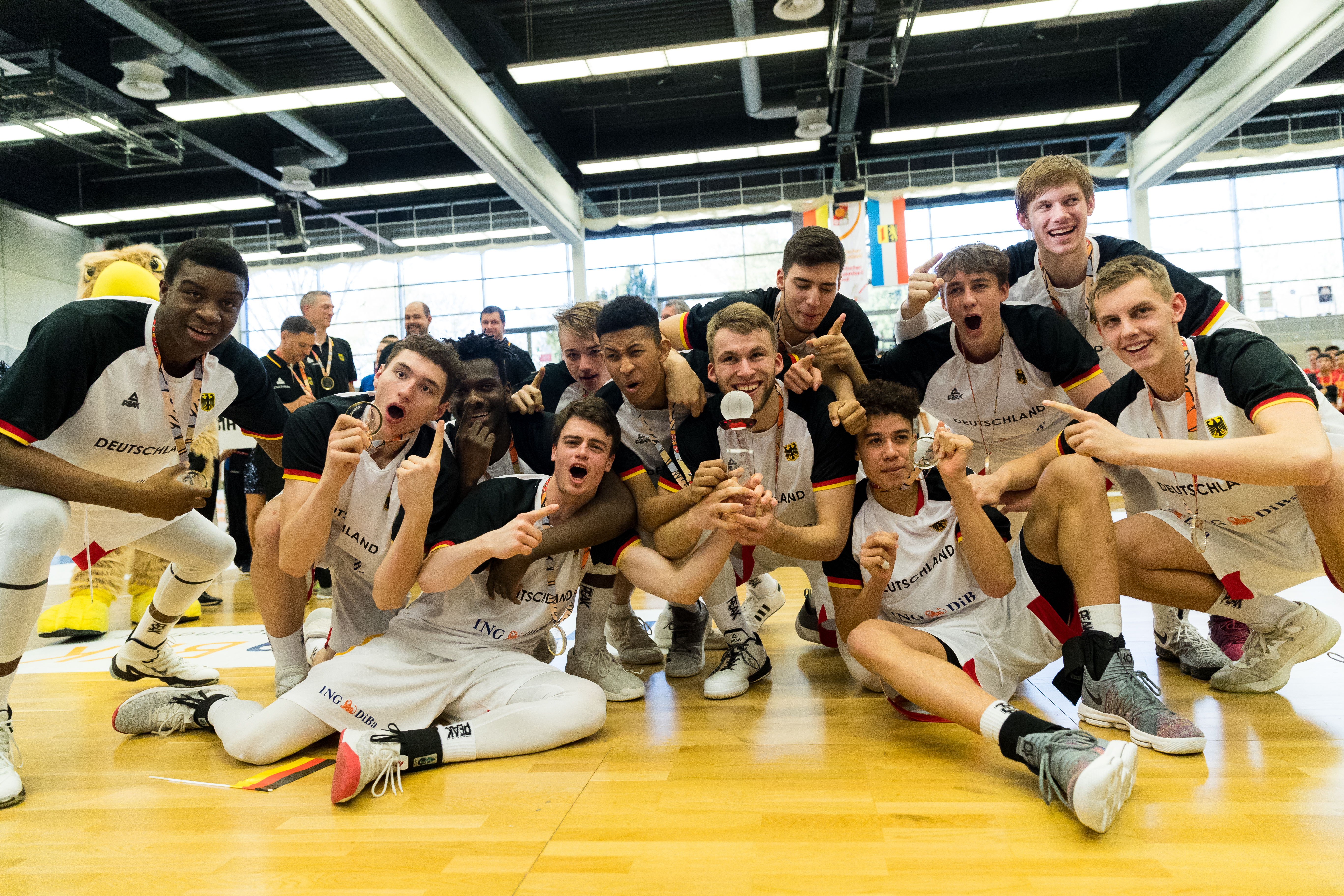 during Closing ceremony Basketball Albert Schweitzer Turnier at GBG Halle, Mannheim, Baden-Württemberg, Germany on 2018-04-07, Photo: Sven Mandel